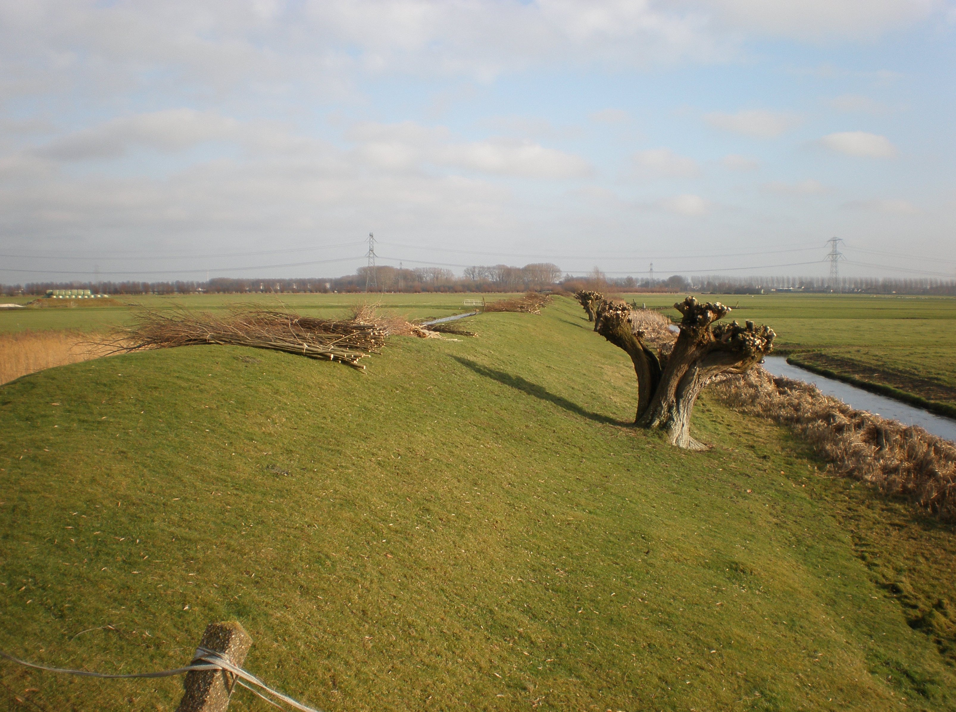 Stelling van Amsterdam: Liniewall Geindijk-Nigtevecht